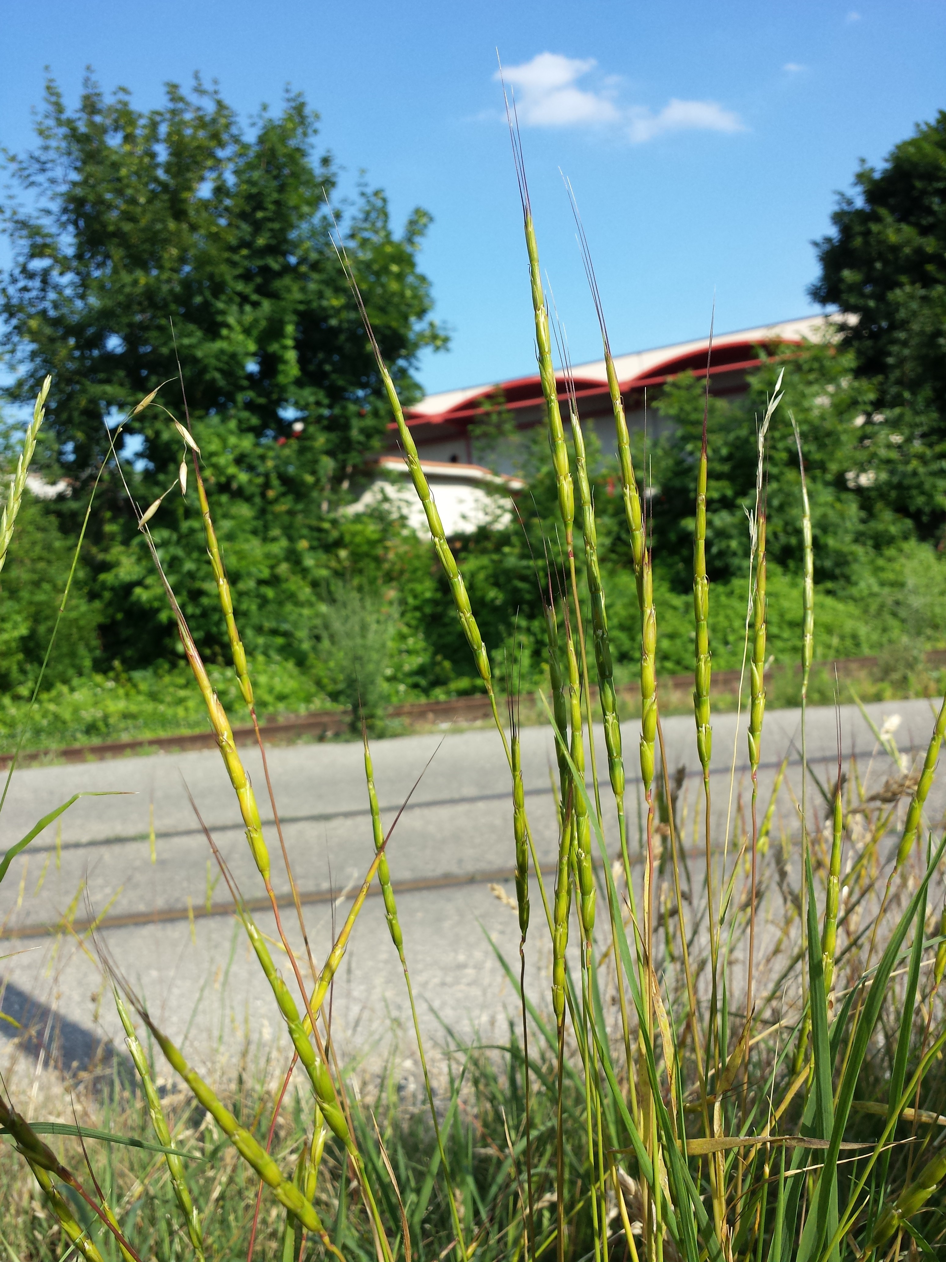 Ähren Taxonym: Aegilops cylindrica ss Fischer et al. EfÖLS 2008 ISBN 978-3-85474-187-9 Fundort: Bahnhof Wien-Floridsdorf, Wien-Floridsdorf - ca. 160 m ü. A. Standort: Eisenbahn-Ruderalfläche